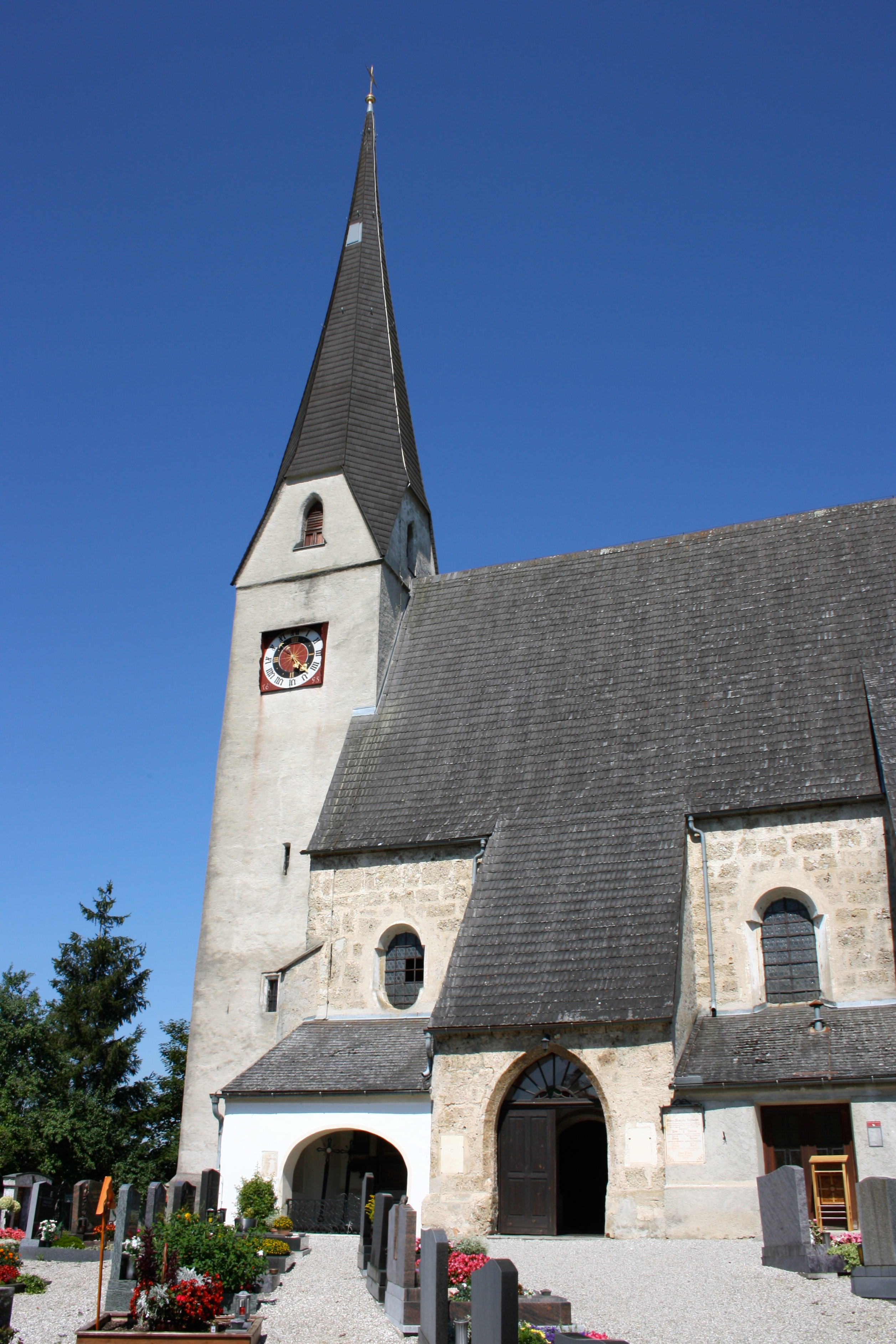 Kath. Pfarrkirche hl. Georg und Friedhof